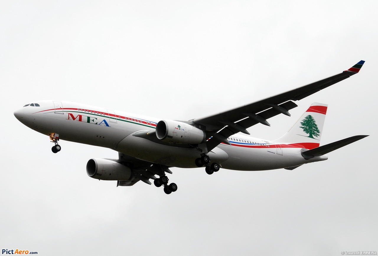 Photo prise à l'aéroport de Toulouse-Blagnac (LFBO) en France. Picture take at Toulouse-Blagnac Airport (LFBO) in France.